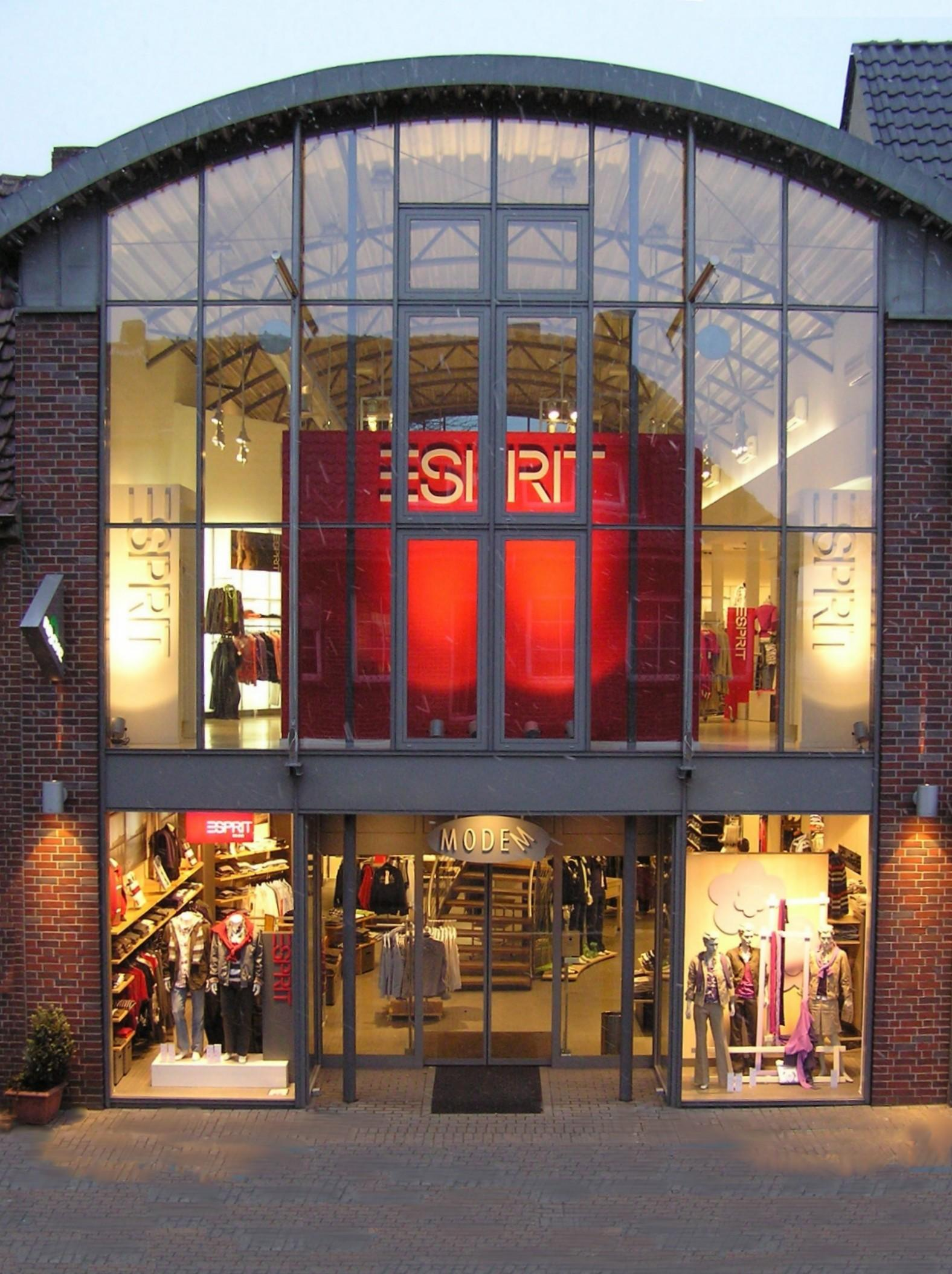 Modem